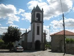 marante Sanche Igreja matriz